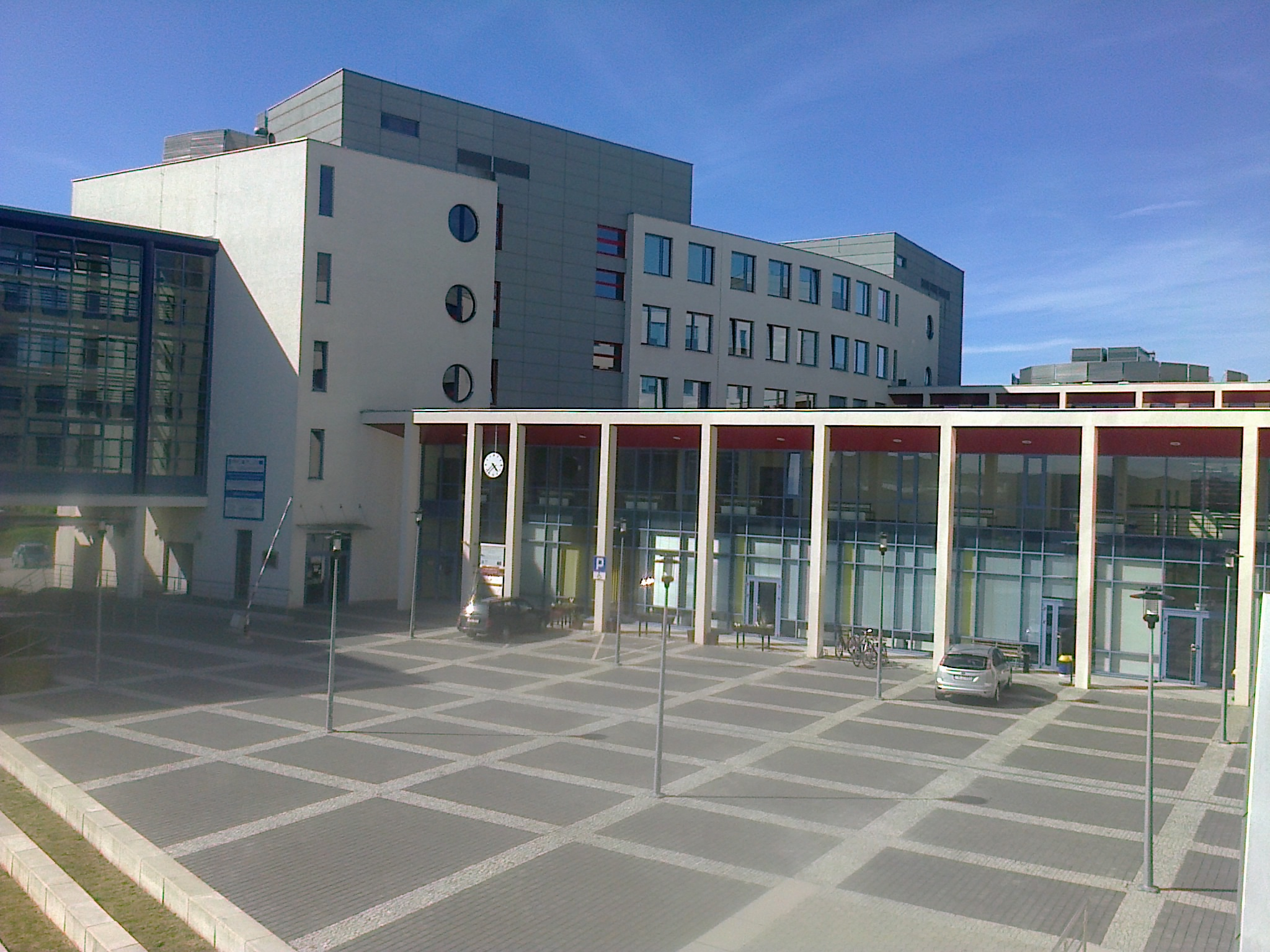 Budynek Instytutu Chemii Uniwersytetu Jana Kochanowskiego w Kielcach przy ul. Świętokrzyskiej